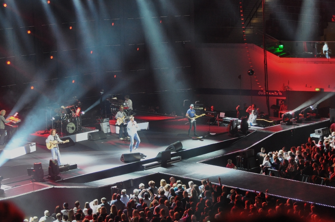 die deutsche Rockband Pur' 2013